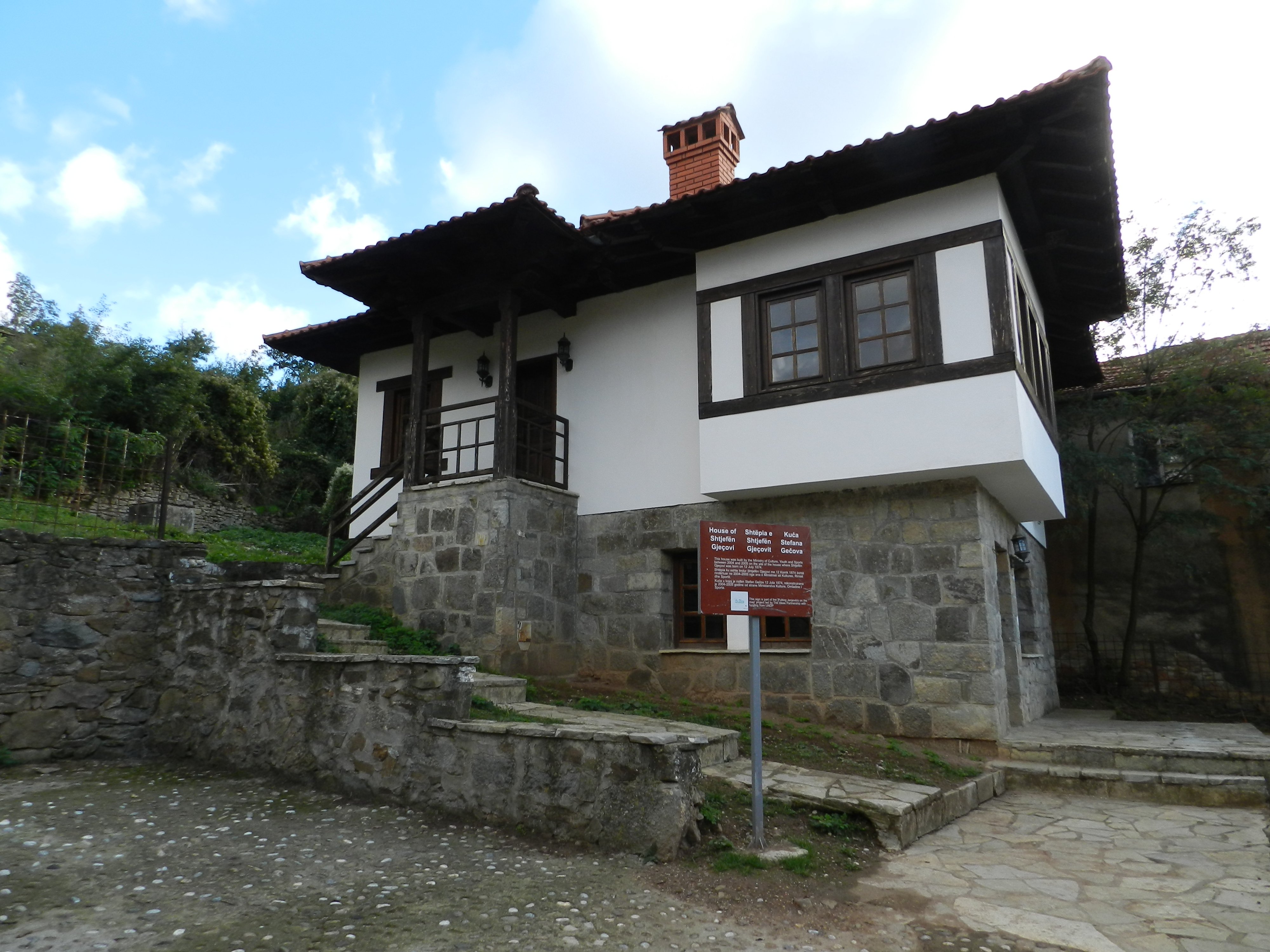 Shtëpia Muze e At Shtjefën Gjeqovit